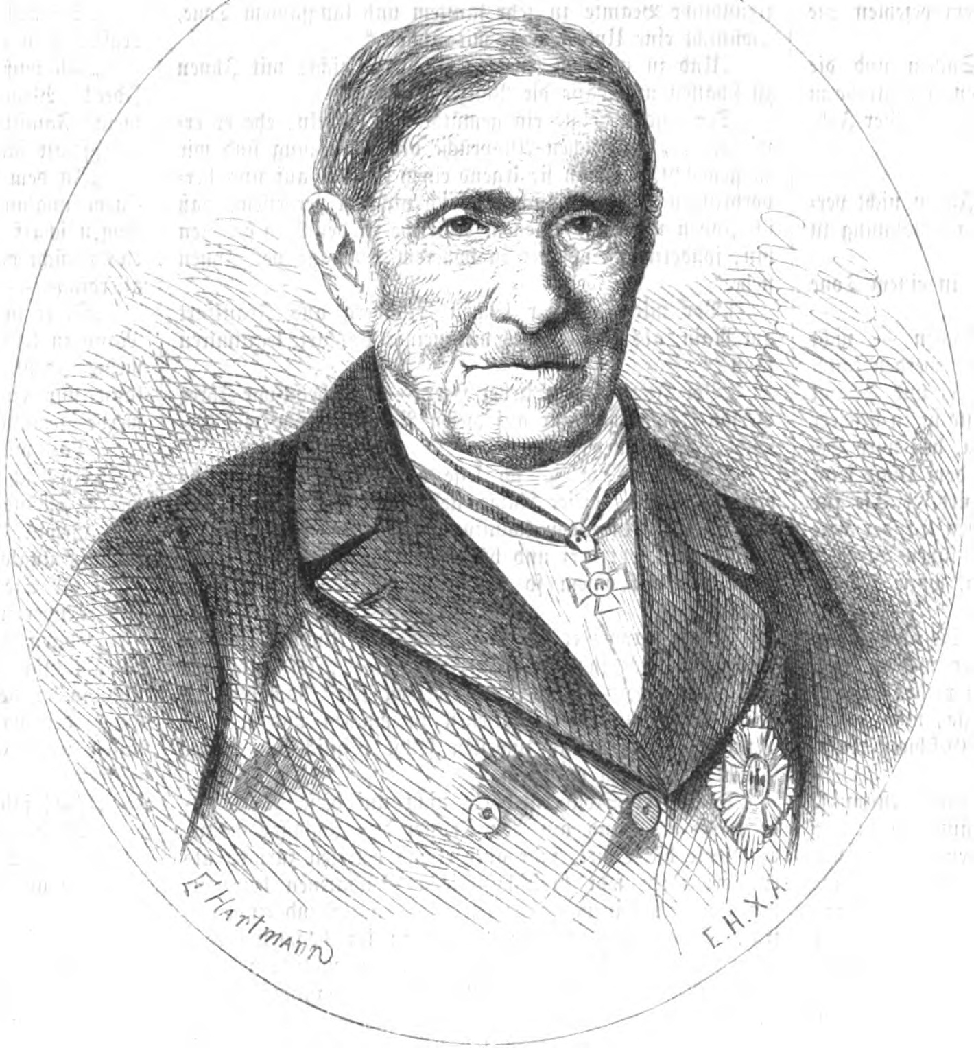 Samuel Marot, evangelischer Theologe und Freimaurer im Berlin des 19. Jahrhunderts.